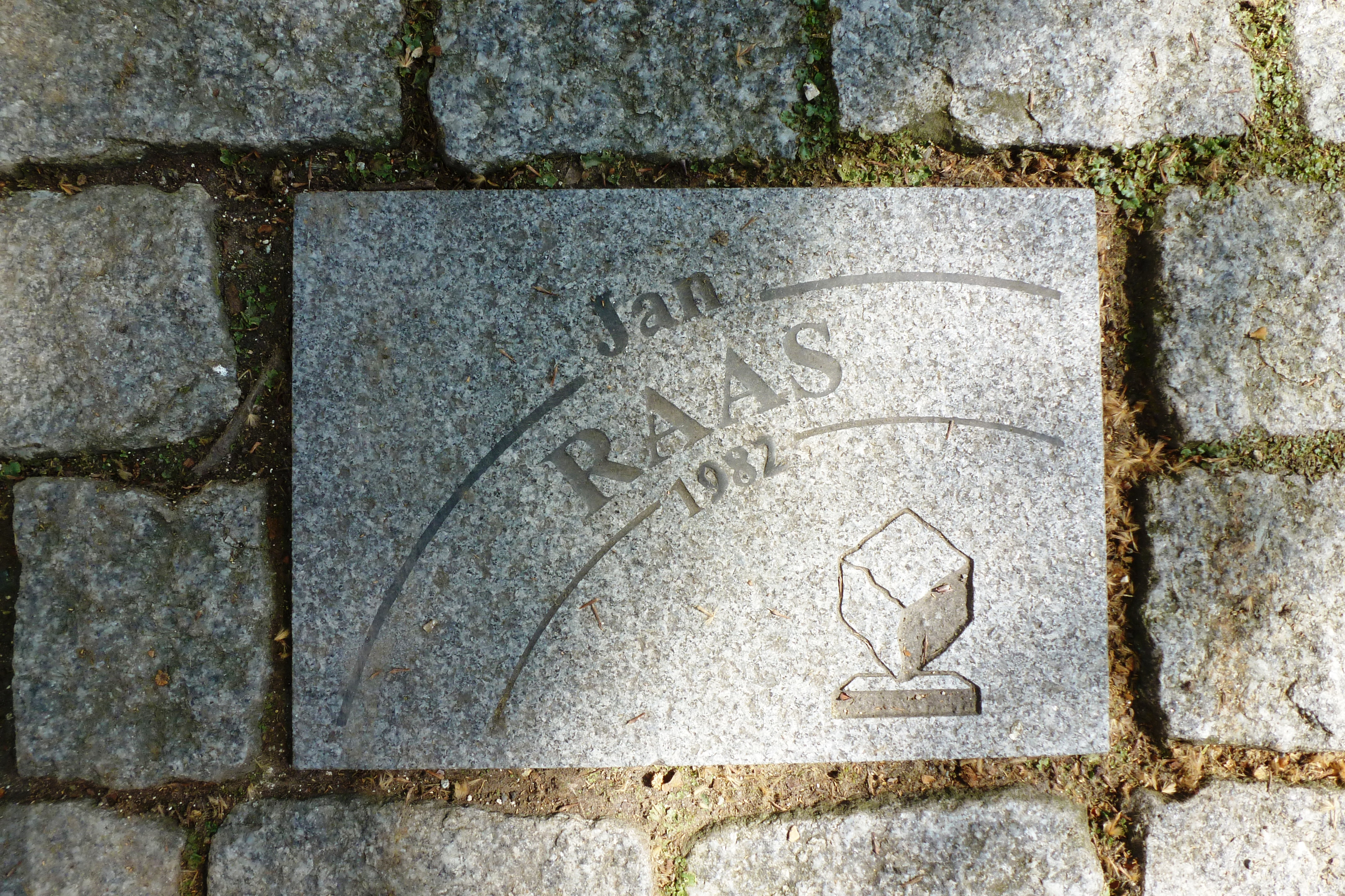 Pflasterstein für Jan Raas auf der Allée Charles Crupelandt in Roubaix